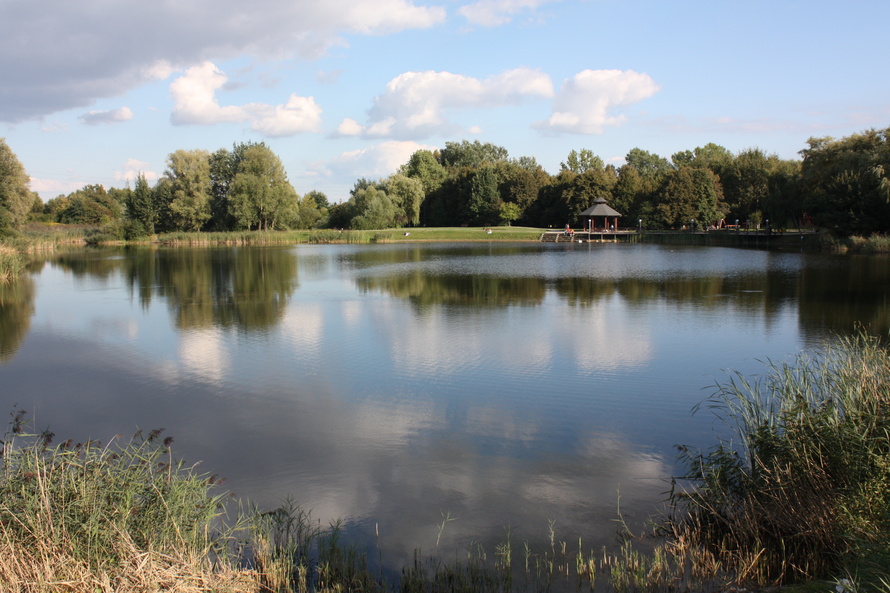 Glinki żbikowskie zwane też glinkami Hosera w Pruszkowie